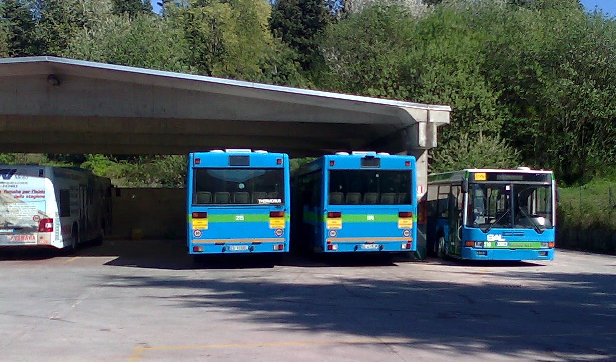 Quattro autobus della SAL di Lecco nel deposito di Barzanò (un Mercedes Citaro, due Mercedes O405G e un Ikarus 41704)